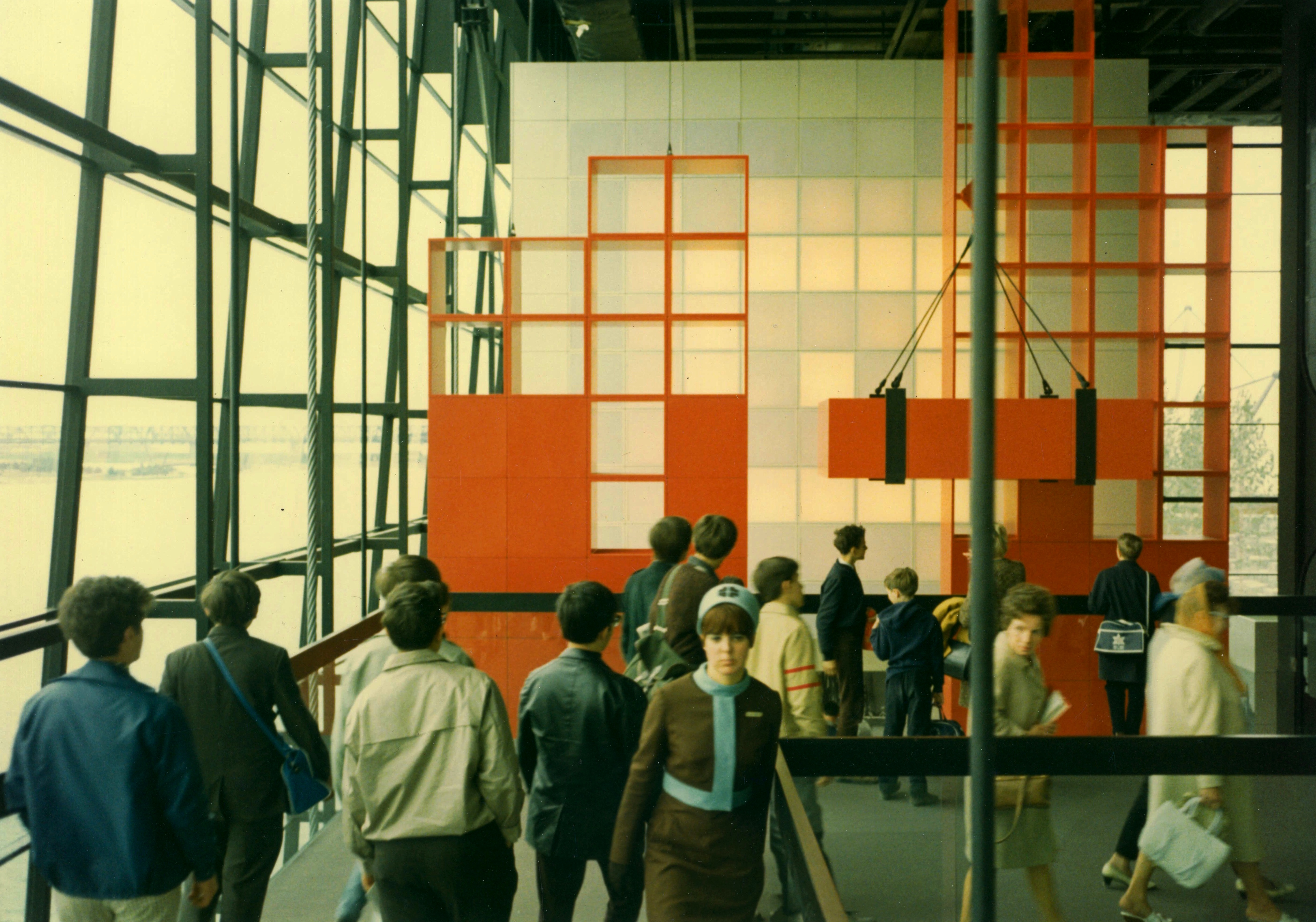 La ville (vue par les visiteurs depuis la rampe descendante), Pavillon du Québec, Expo 67 - Designer de l'exposition: Gustave Maeder